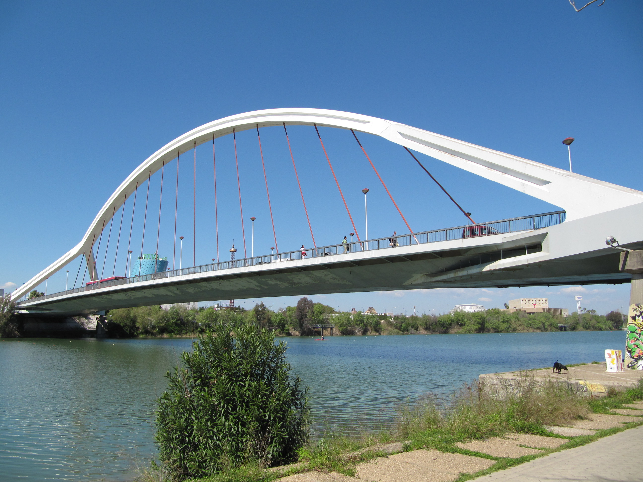 Puente de la Barqueta - March 2011